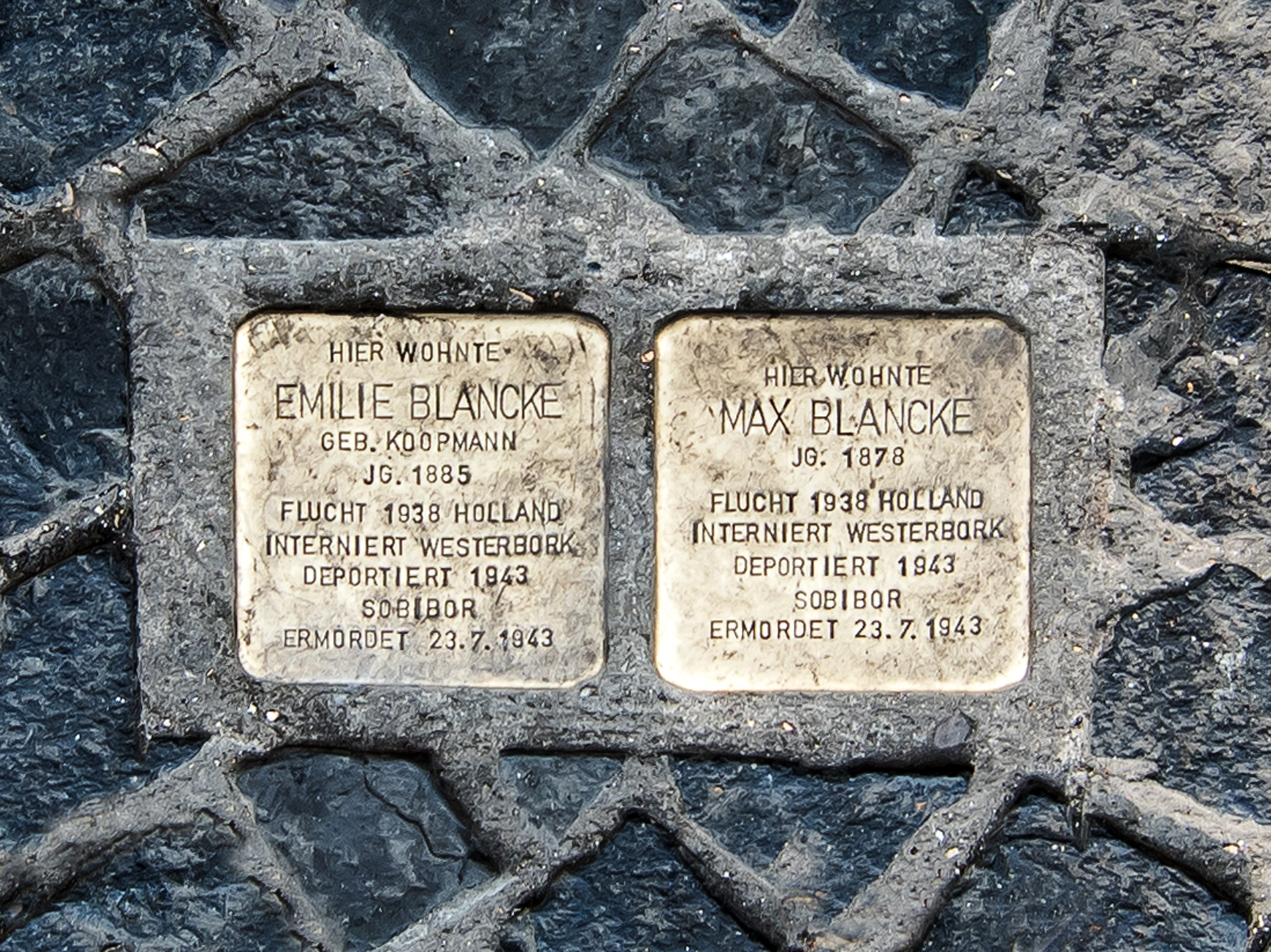 Stolpersteine von Max und Emilie Blancke in Dortmund